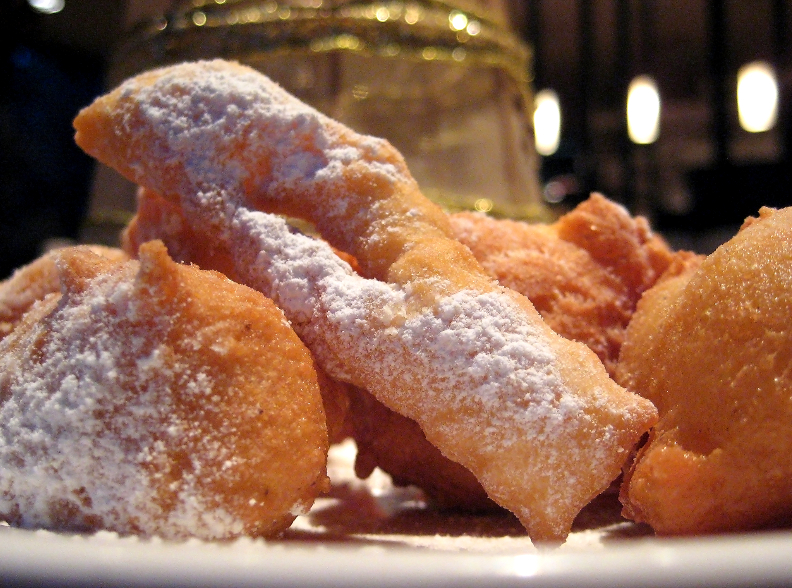 Kroštule i fritule